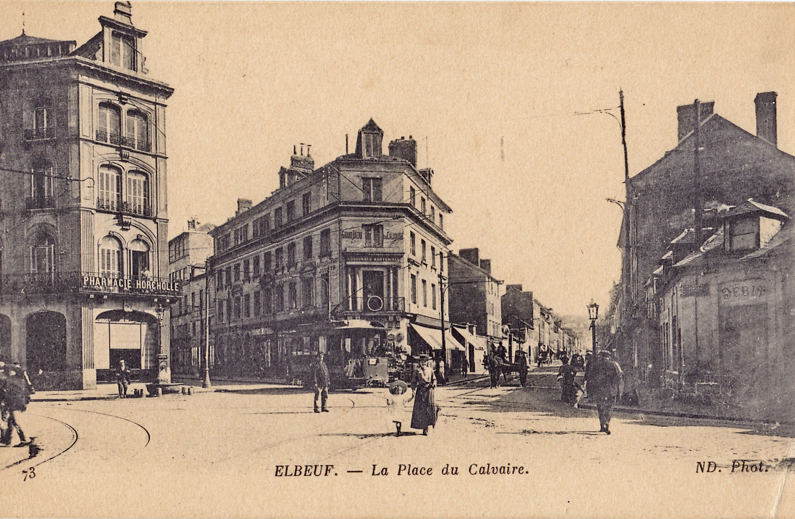 Carte postale ancienne éditée par ND, n°73 : ELBEUF - La Place du Calvaire